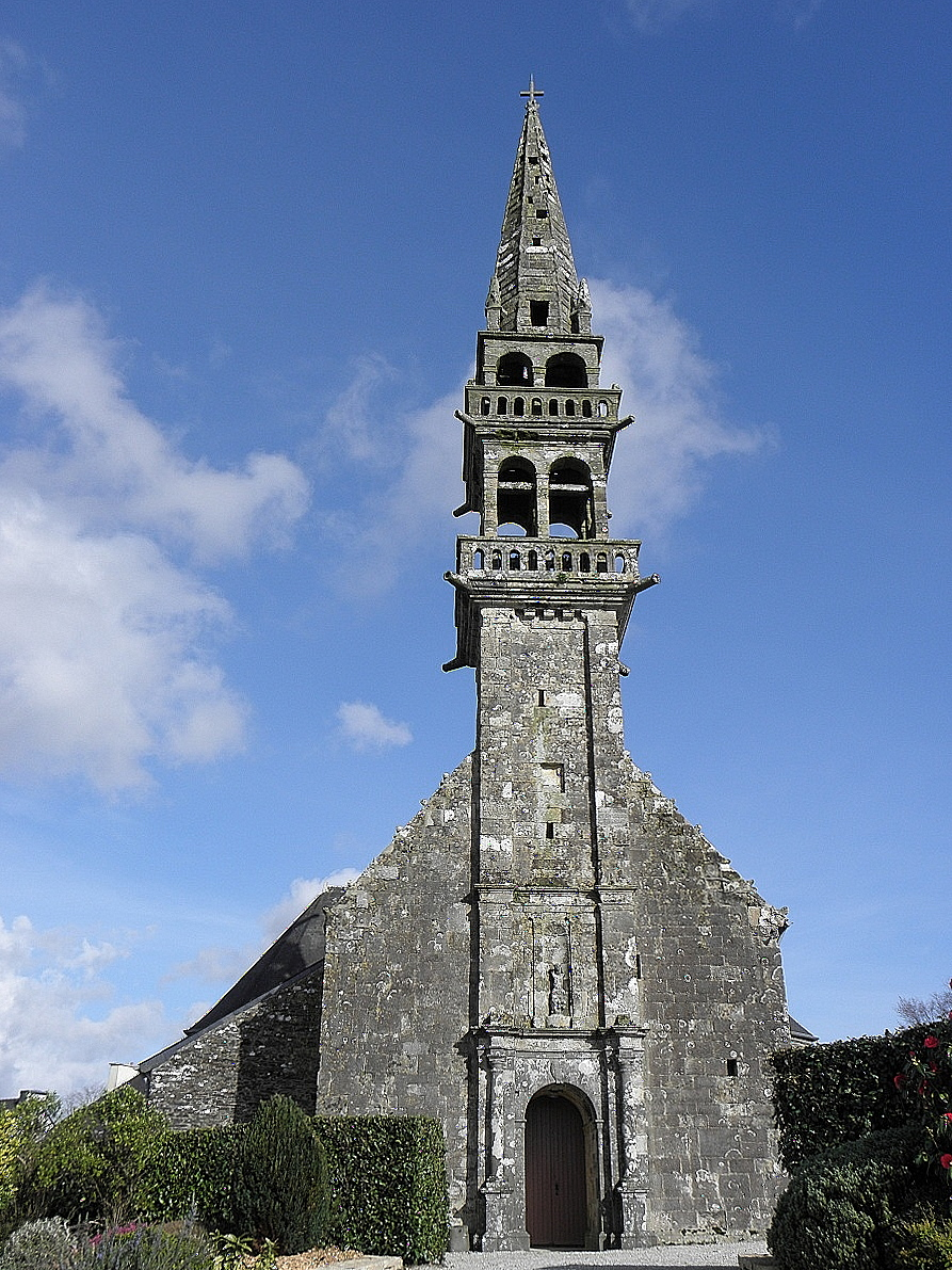 Façade occidentale de l'église de Saint-Urbain (29).